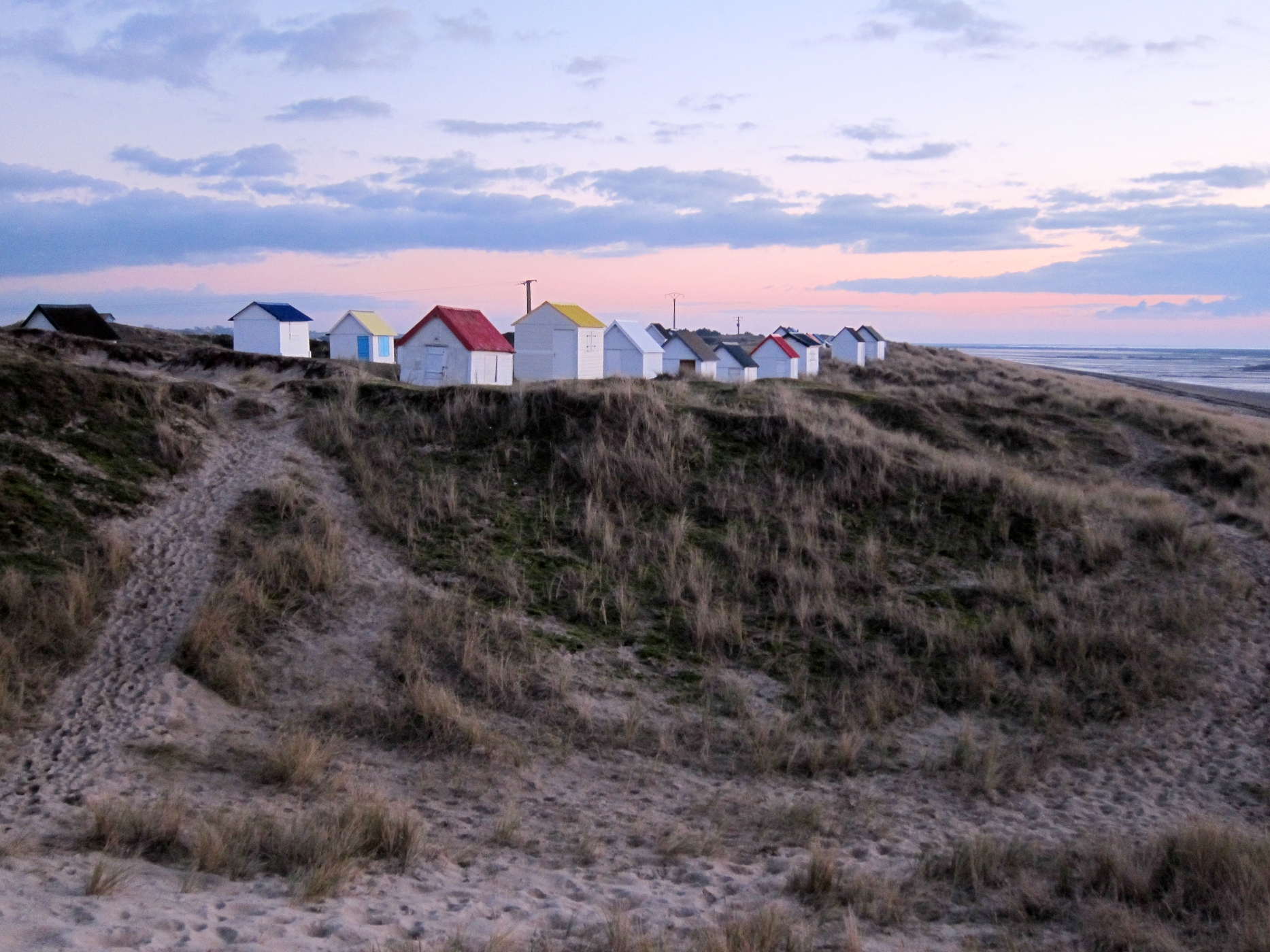 Cabines de plage à Gouville-sur-Mer (Manche).